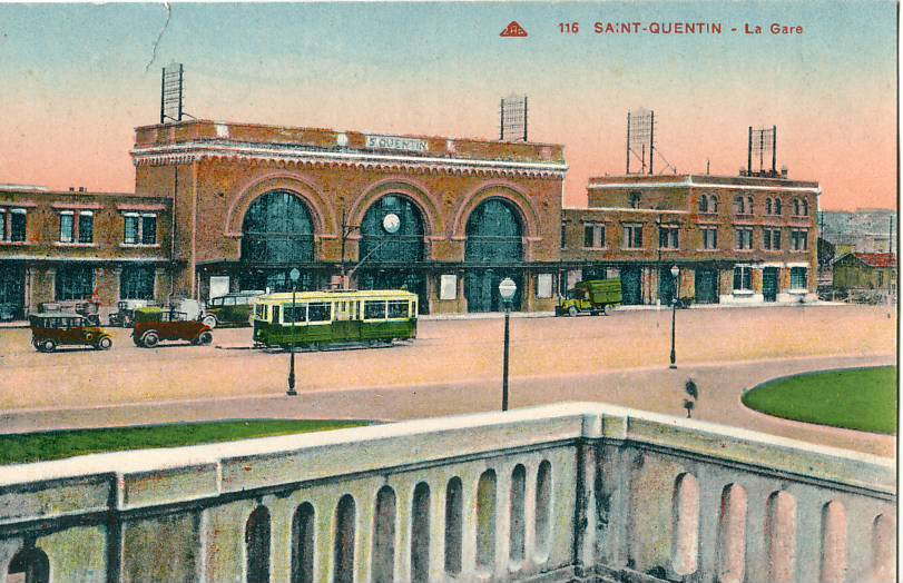 Carte postale ancienne éditée par 2AP, N°116 SAINT-QUENTIN : La Gare (bâtiment de 1926 conçu par Gustave Umbdenstock et Urbain Cassan